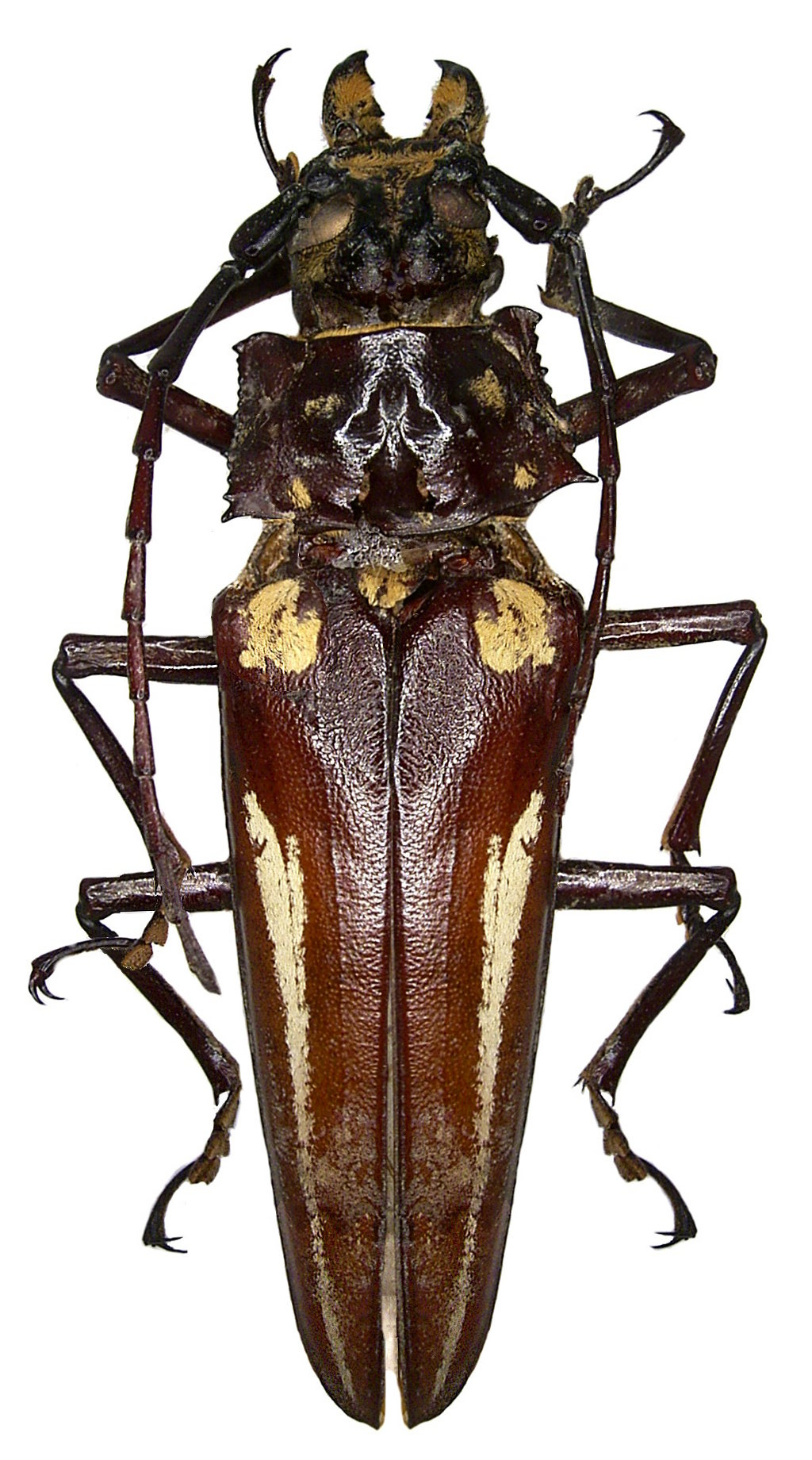 Familie: Cerambycidae Grösse: 75 mm Fundort: Costa Rica, Tarcoles leg. det. U.Schmidt, 1996 Foto: U.Schmidt, 2006